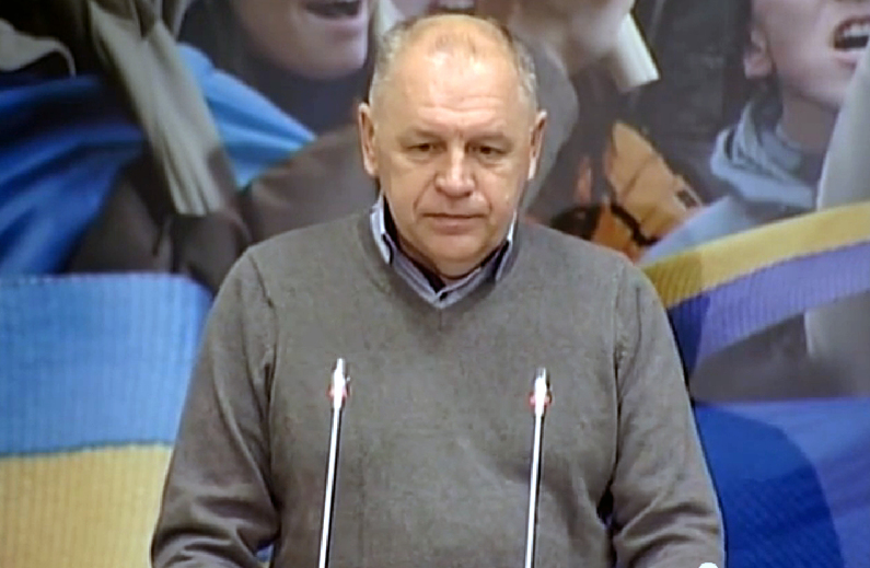 Дубас Богдан Йосипович — український банкир, громадський і державний діяч. Перший заступник голови Київської міської державної адміністрації. Комендант Євромайдану.